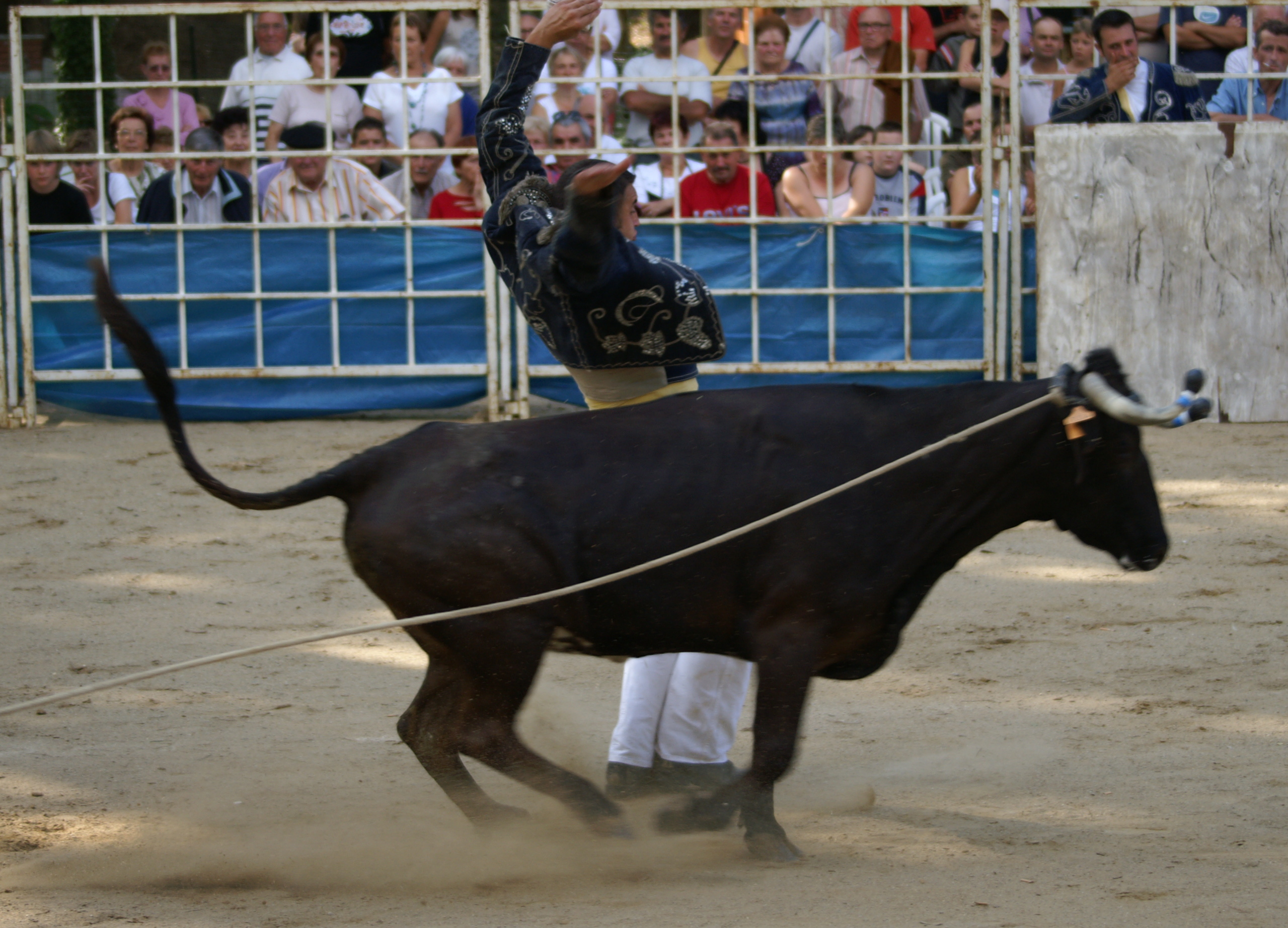 Ecarteur en action dans une course landaise